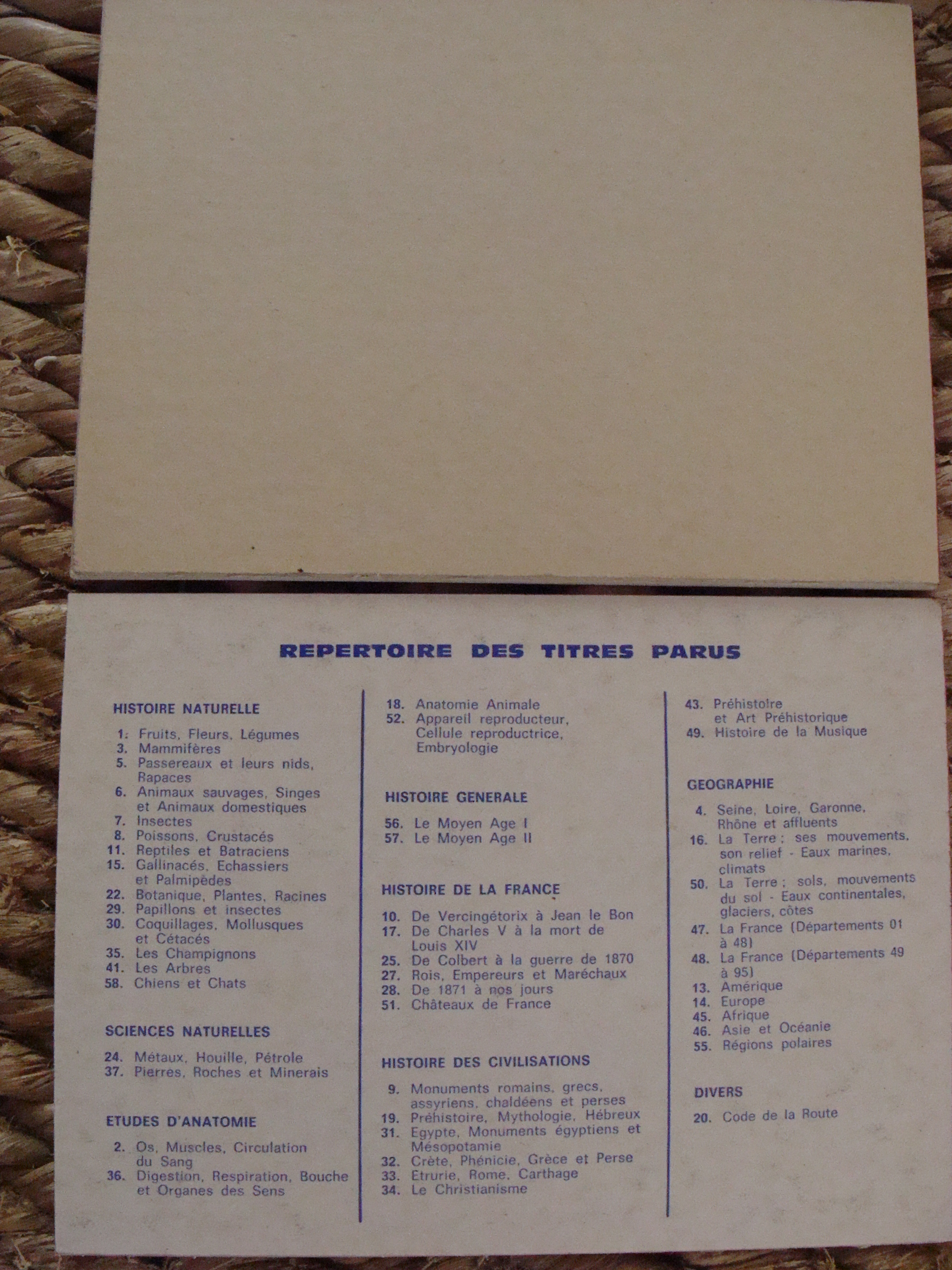 Il s'agit d'aider à différencier les premiers livrets de 16 pages édités entre 1960 et 1962 avec au dos des livrets une simple couverture cartonnée blanche. Alors que le répertoire apparaîtra au dos des livrets pour les éditions de 12 pages dès 1963.